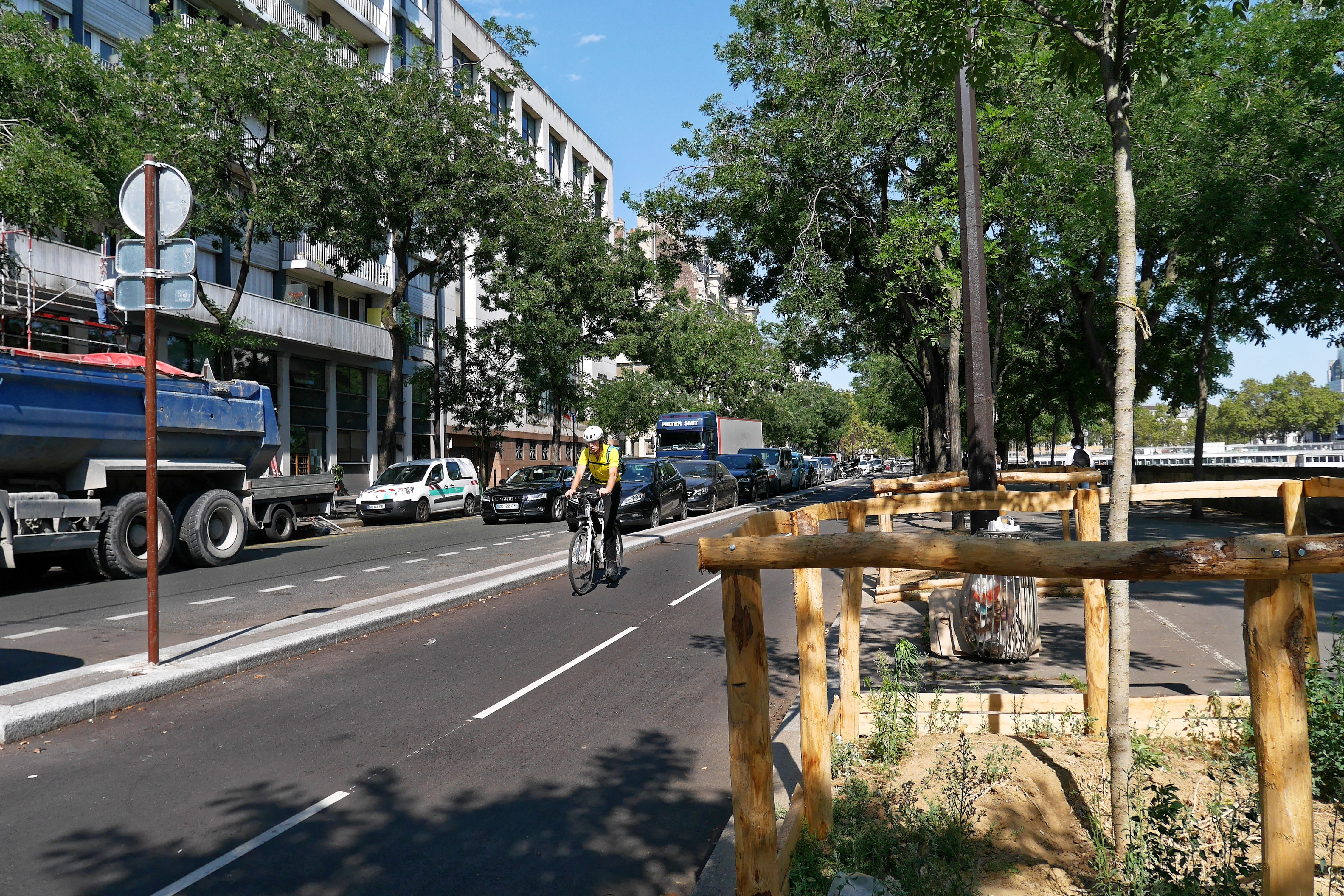 A vélo dans paris